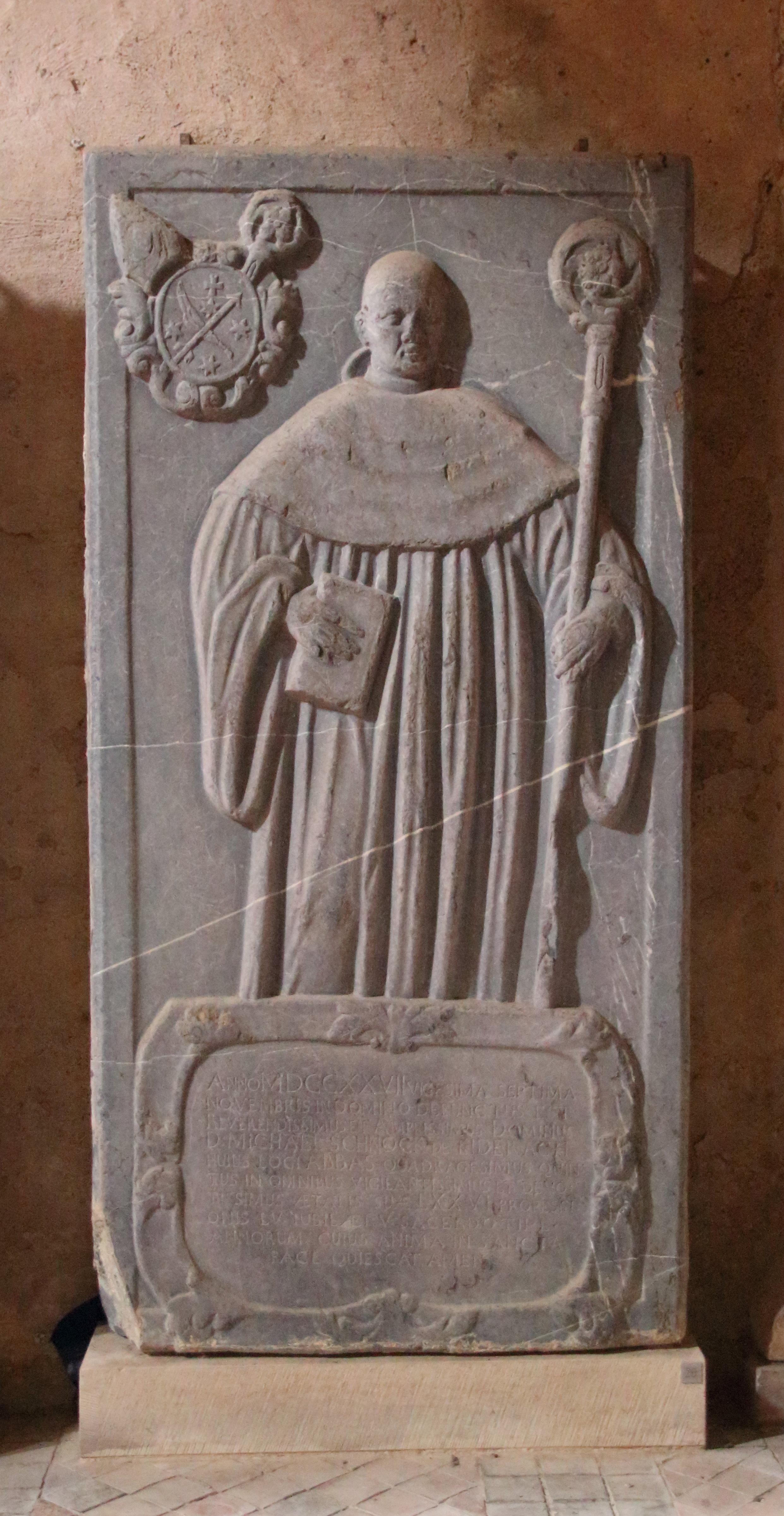 Grabplatte des Eberbacher Abtes Michael Schnock (1652-1727) (Nr. 26). Basilika Kloster Eberbach.